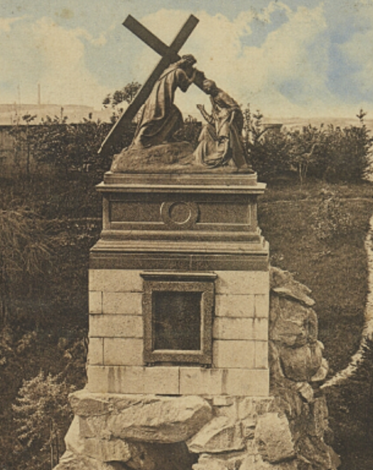 IV stacja drogi krzyżowej wokół Jasnej Góry